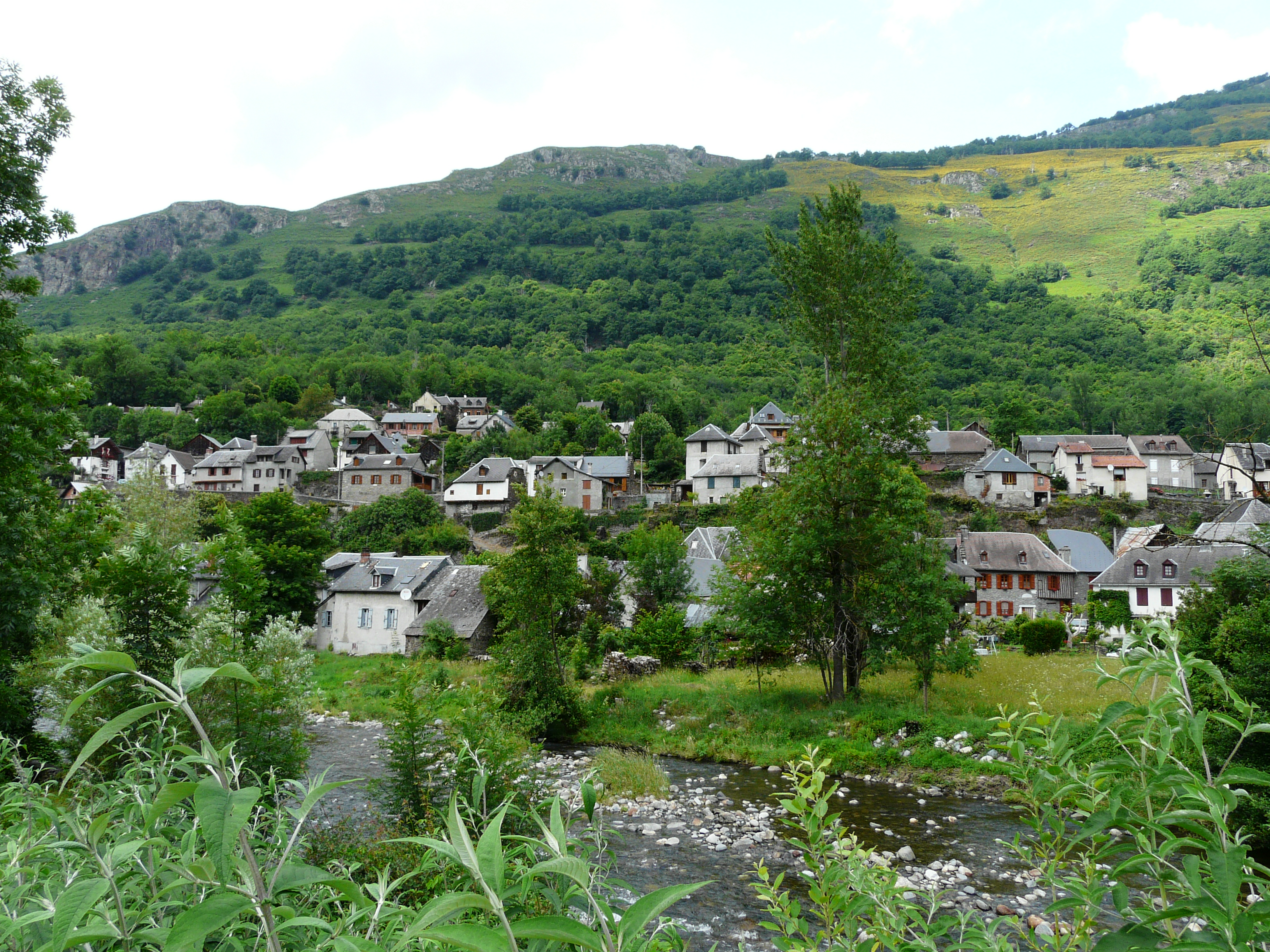 Le village de Fos au bord de la Garonne, Haute-Garonne, France.